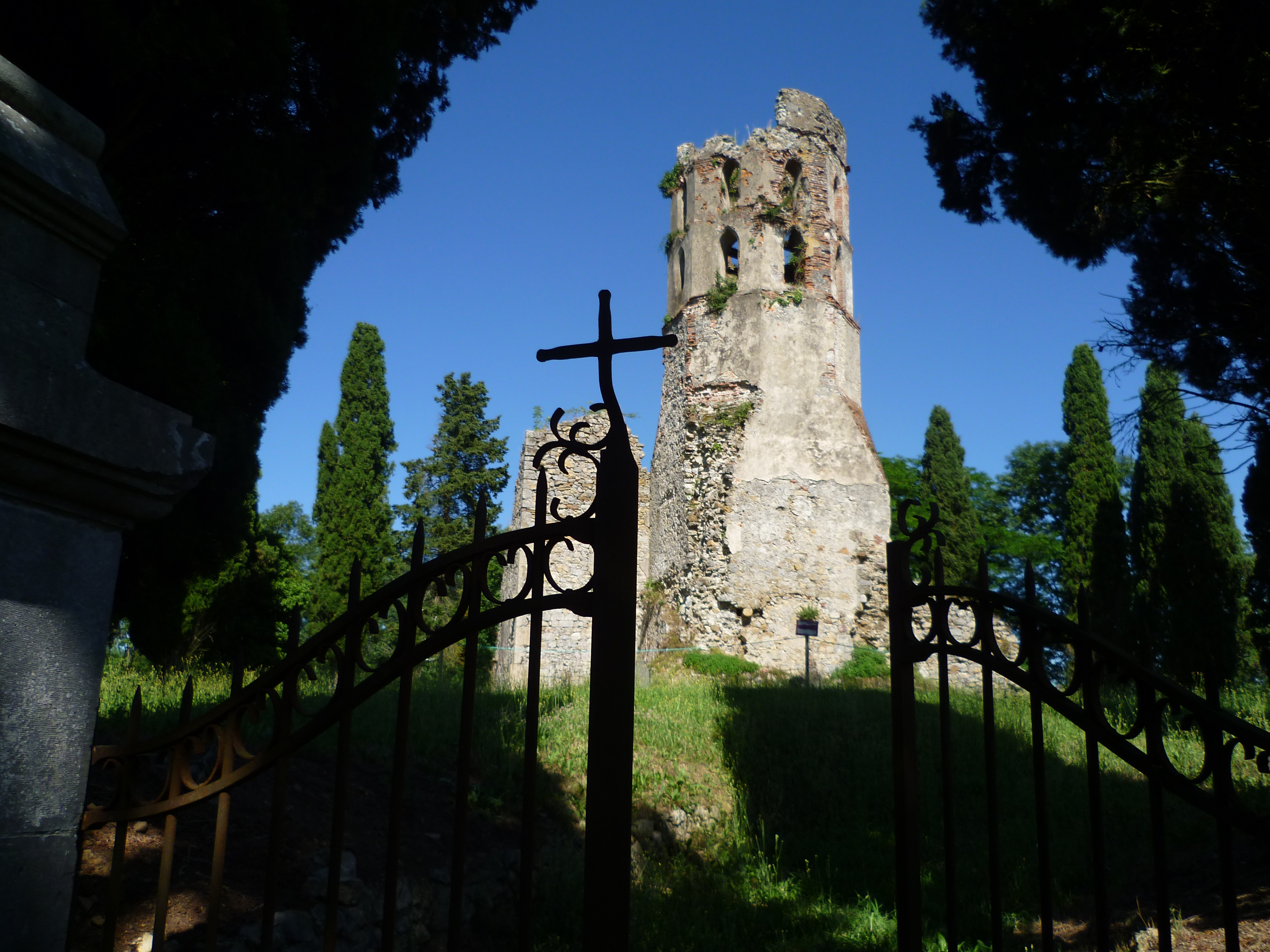 Les ruines de l'église de Noguès (Lescure, Ariège).